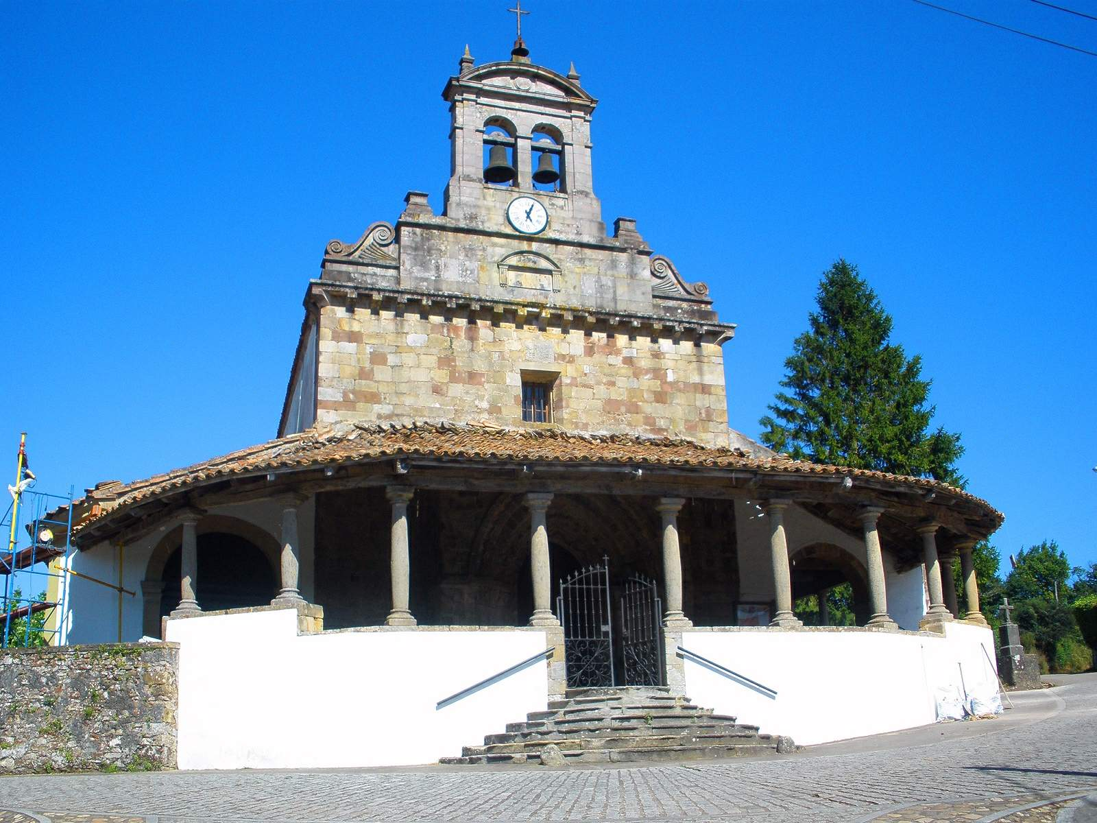 Amandi (Villaviciosa, Asturias) - Iglesia de San Juan